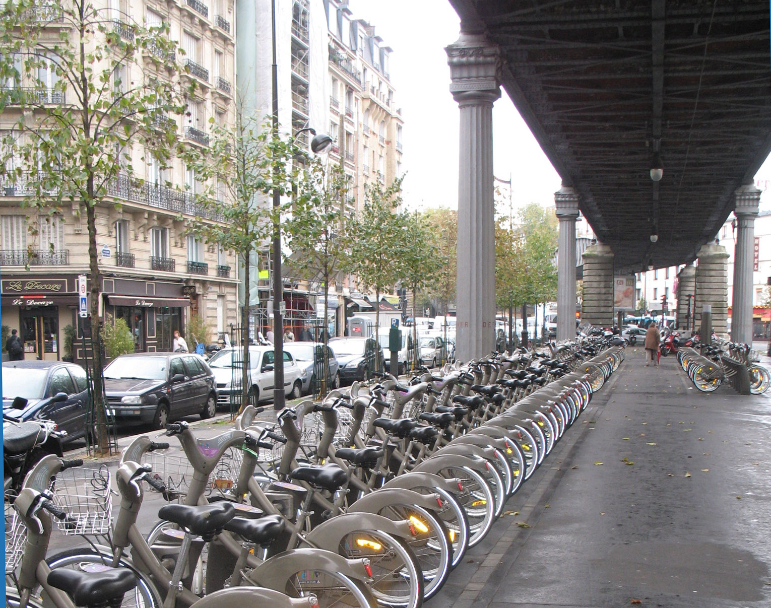 Le boulevard de Grenelle au métro Dupleix, Paris 15e, France